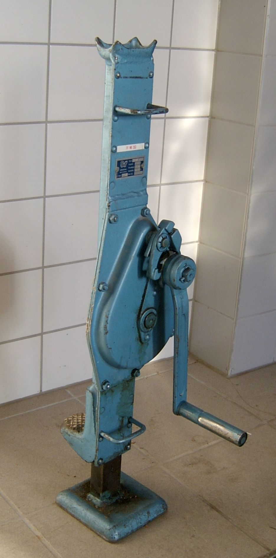 Universalwinde, selbst fotografiert 18.10.2004